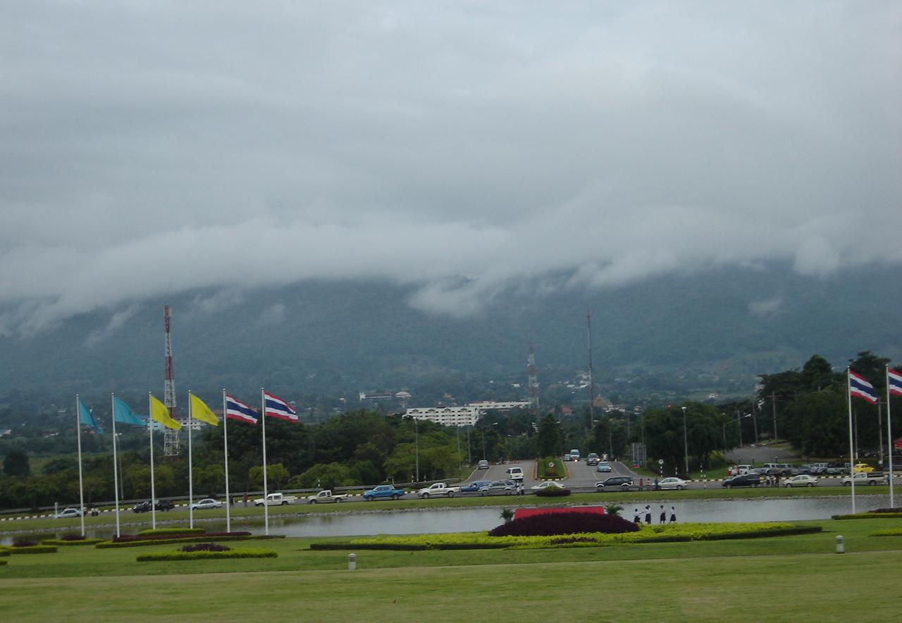 Mae Fah Luang university, Chiangrai, Thailand